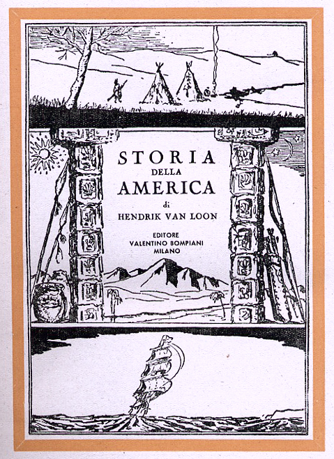 Foto del Frontespizio - Storia della America - Edizione del 1946